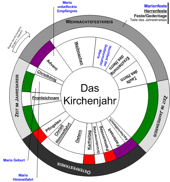 Vereinfachte, schematische Darstellung des liturgischen Jahres (katholisch) Hinweis: im äußersten Kreis ist der jeweilige Festkreis oder die Zeit im Jahreskreis bestimmt; im nächsten inneren Kreis die jeweilige Liturgische Farbe; dann folgen einzelne Feste bzw. Zeitabschnitte; Sonstiges: Abbildung dient zur Ministrantenausbildung, vereinfachte Darstellung